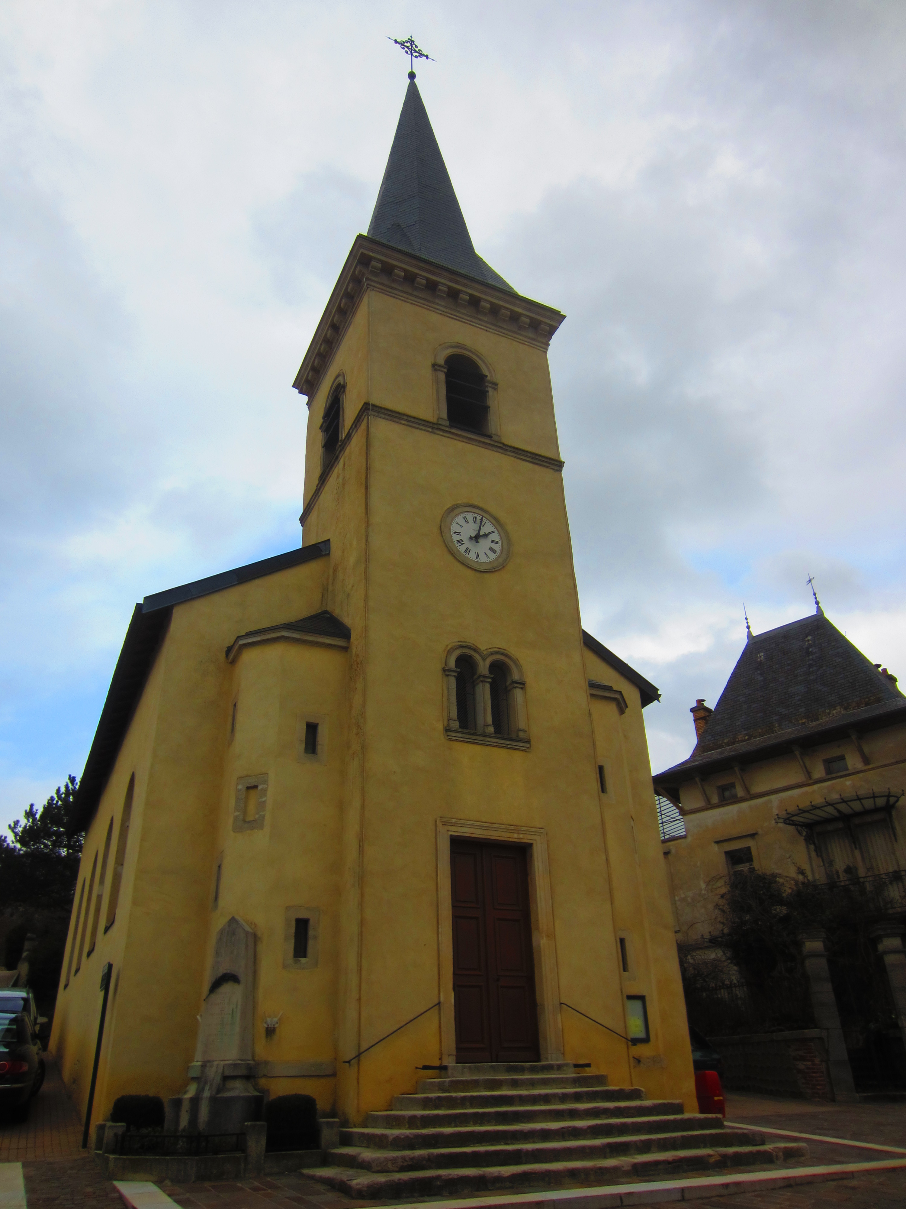 Dommartemont eglise